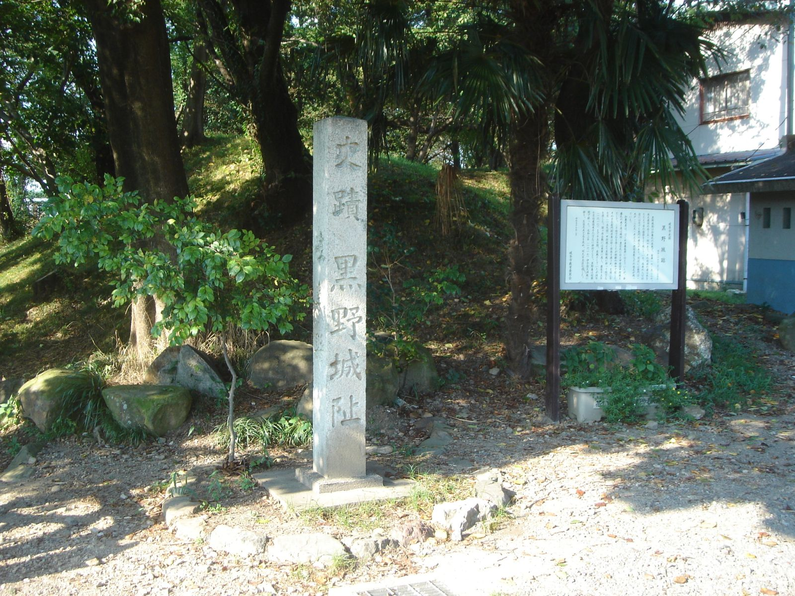 黒野城址碑、岐阜県岐阜市で撮影。